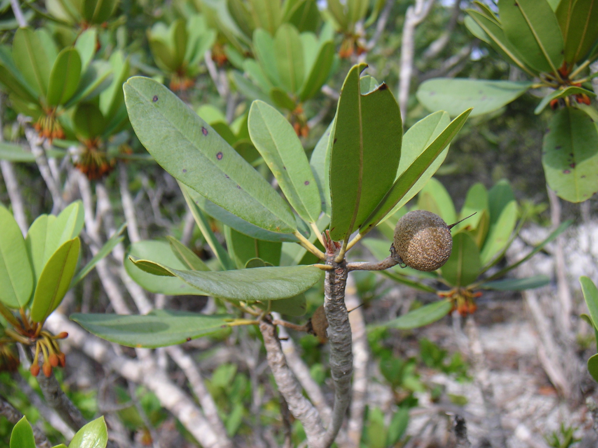 Manilkara jaimiqui subsp. emarginata (= M. bahamensis)